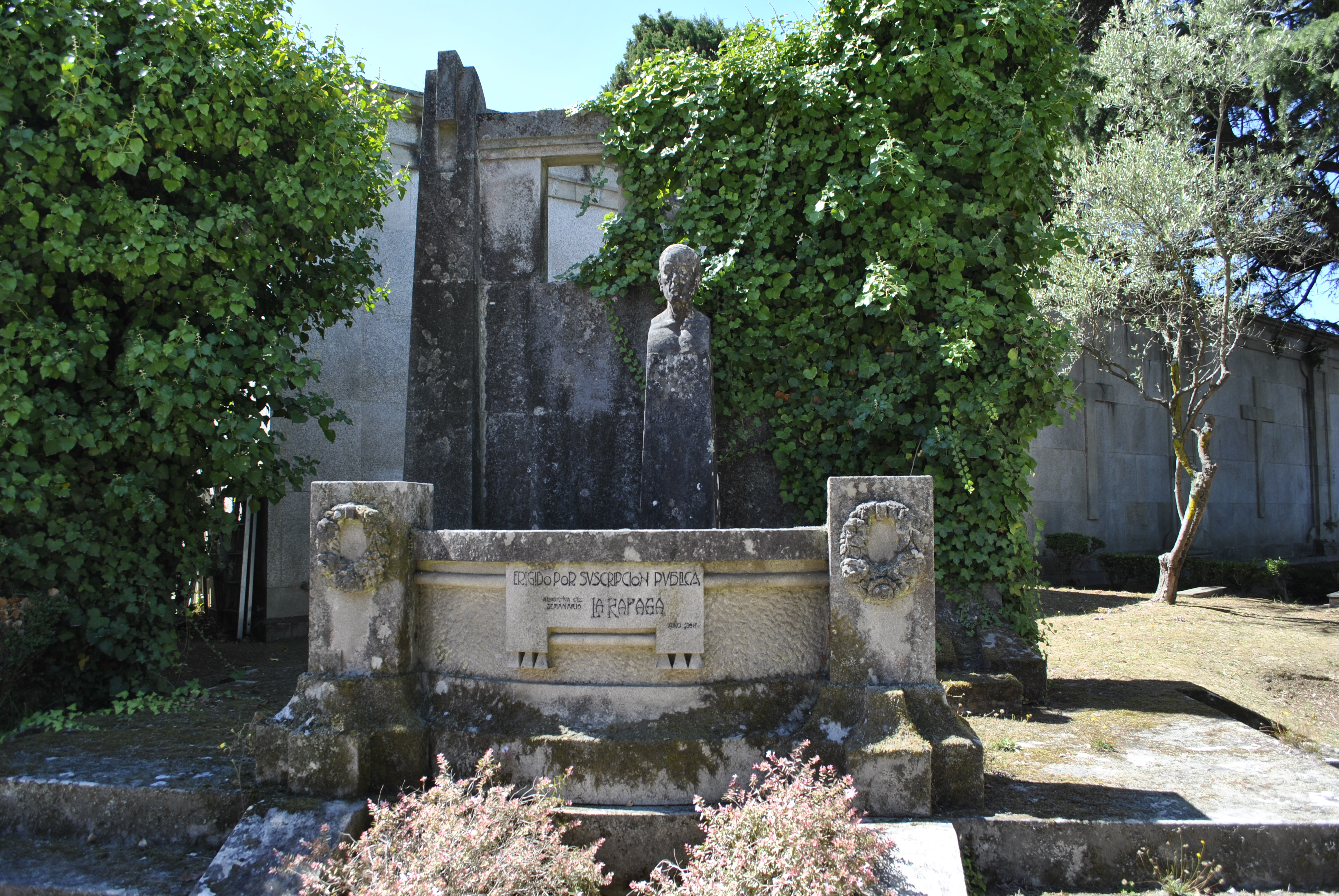 Maestro Elías Pérez Martínez, diseñado por Jenaro de Lafuente (1918).jpg